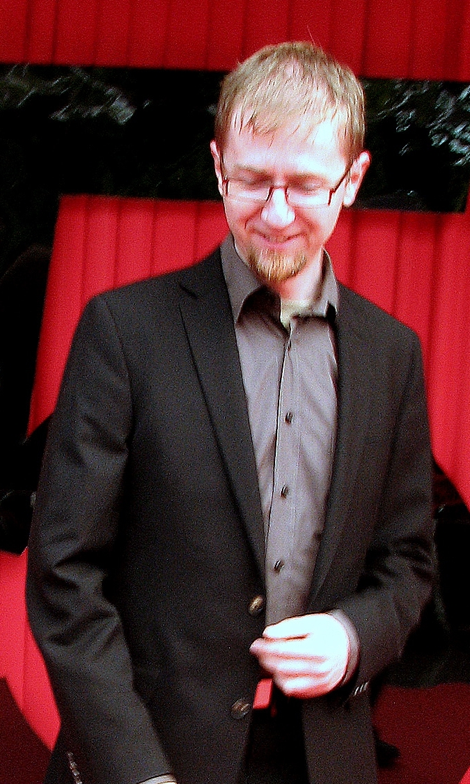 Tomasz Bagiński at opening of the XXXV Polish Film Festival in Gdynia 2010.